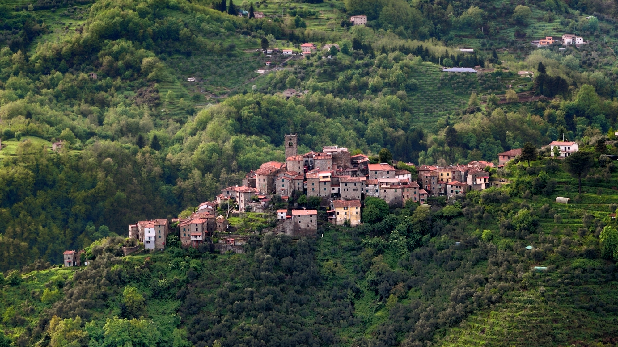 Sorana This is a photo of a monument which is part of cultural heritage of Italy.